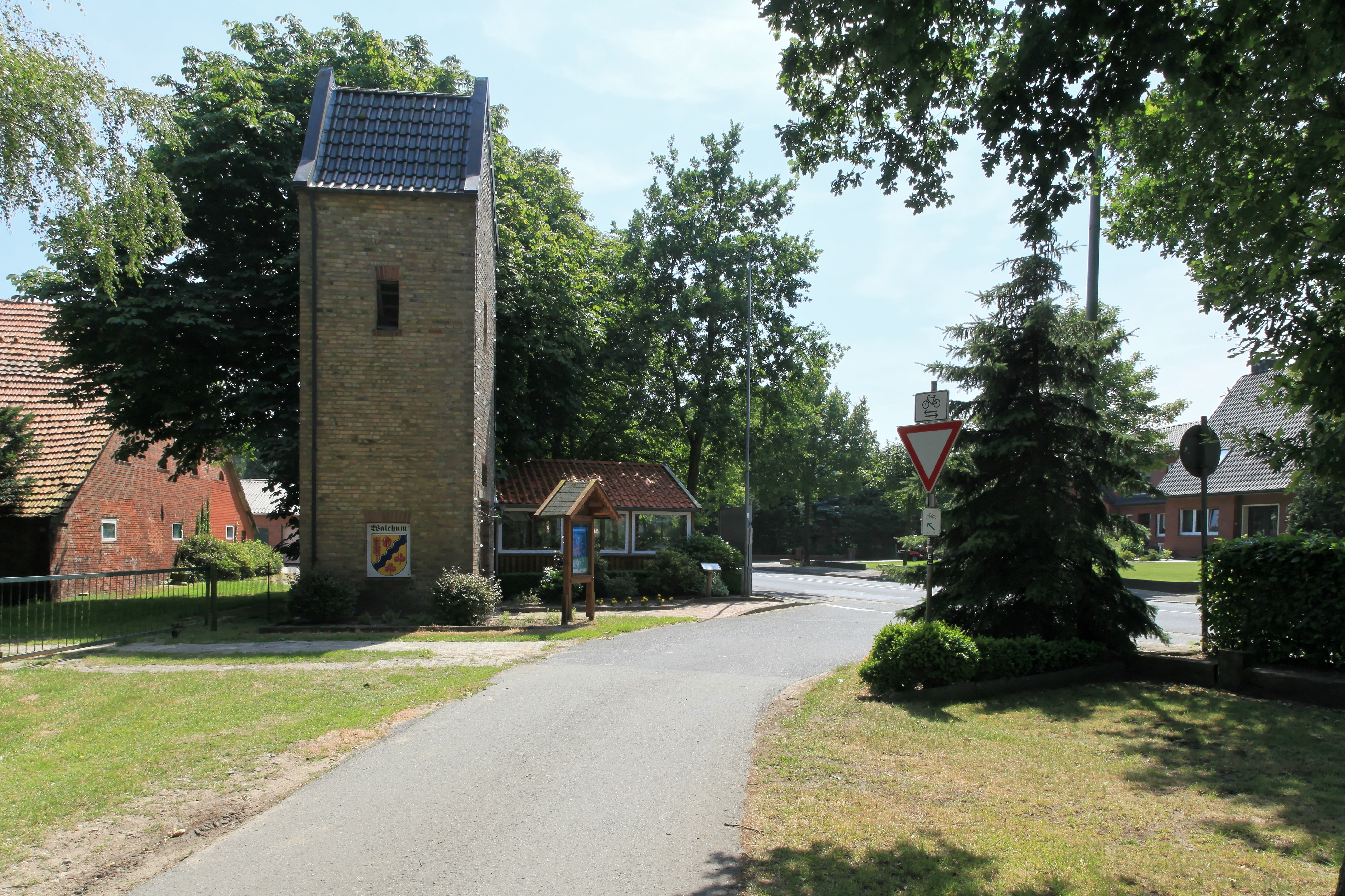 Glockenturm an Marschstraße und Hauptstraße in Walchum